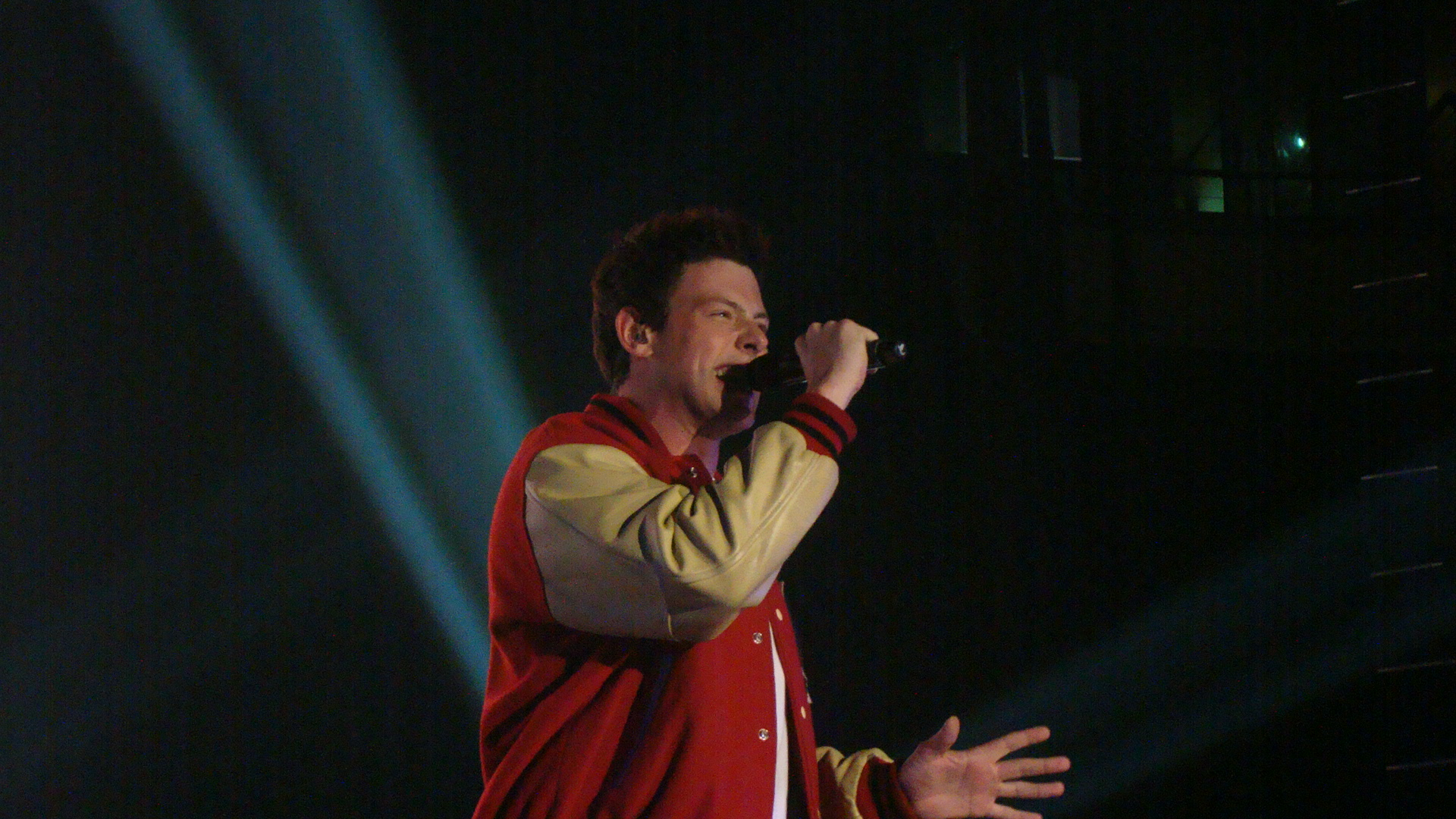 Jessie's Girl